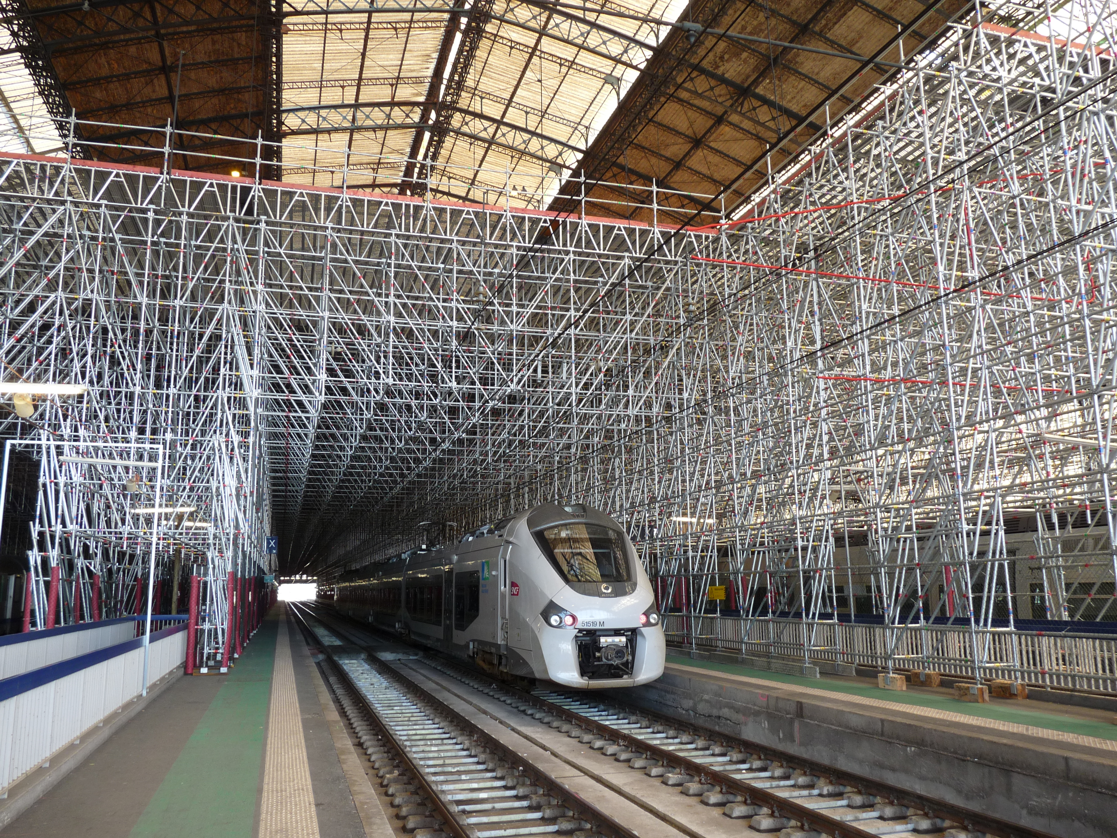 TER trein onder de steigers